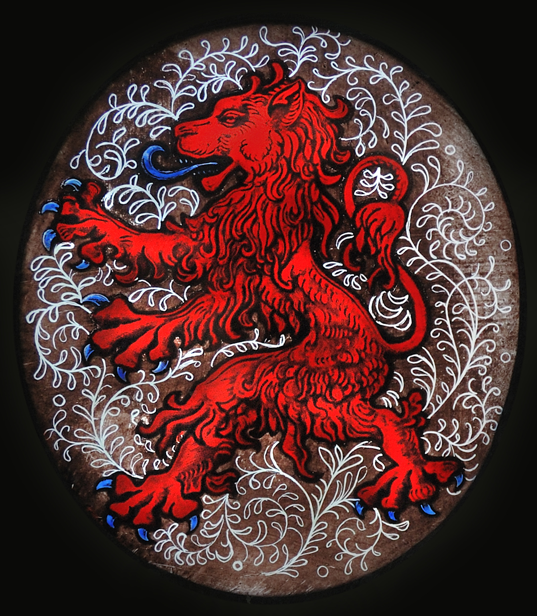 Bergse leeuw op een glas-in-lood-venster in het raadhuis van Vohwinkel